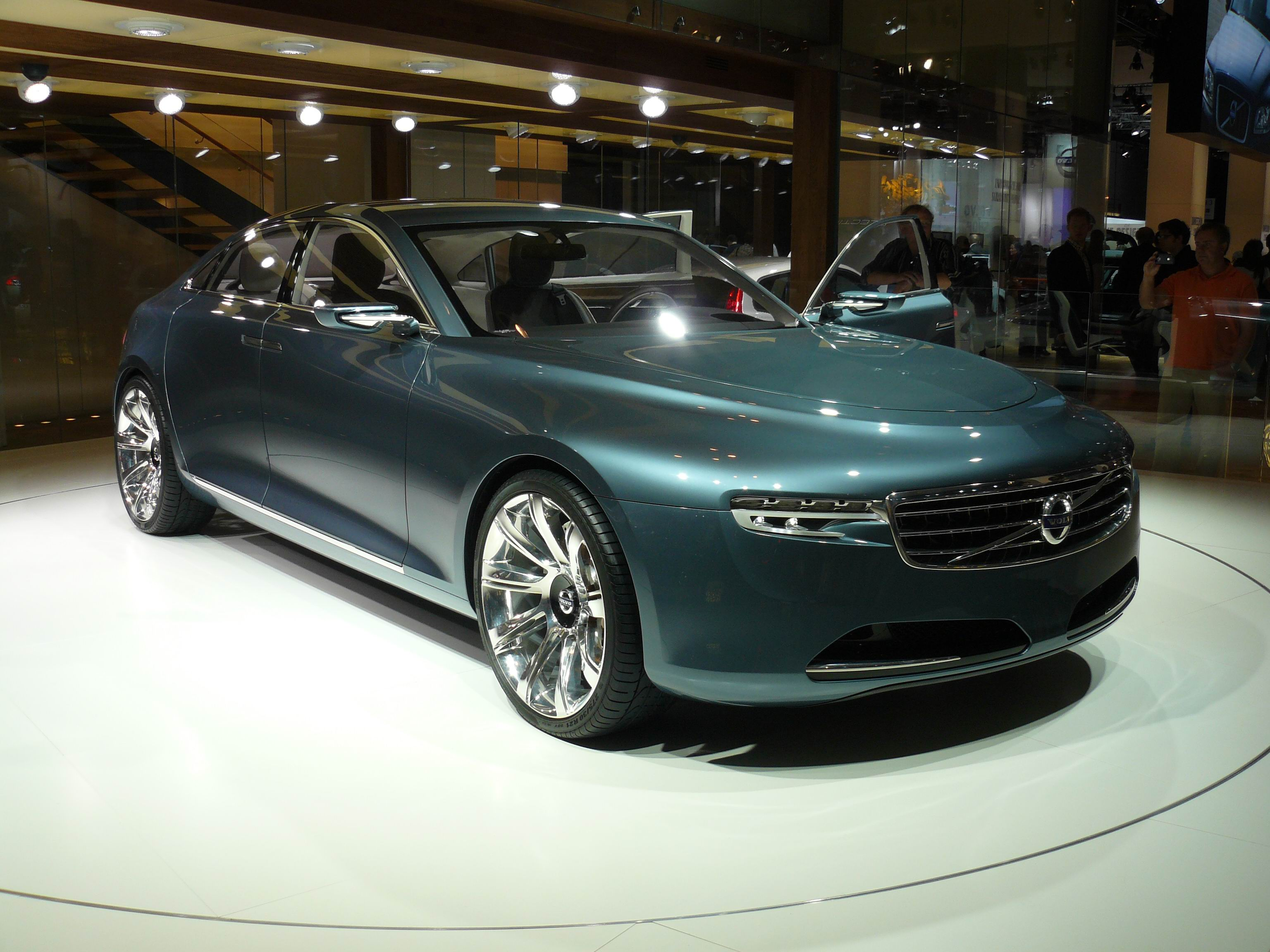 Volvo You, Francfort 2011.